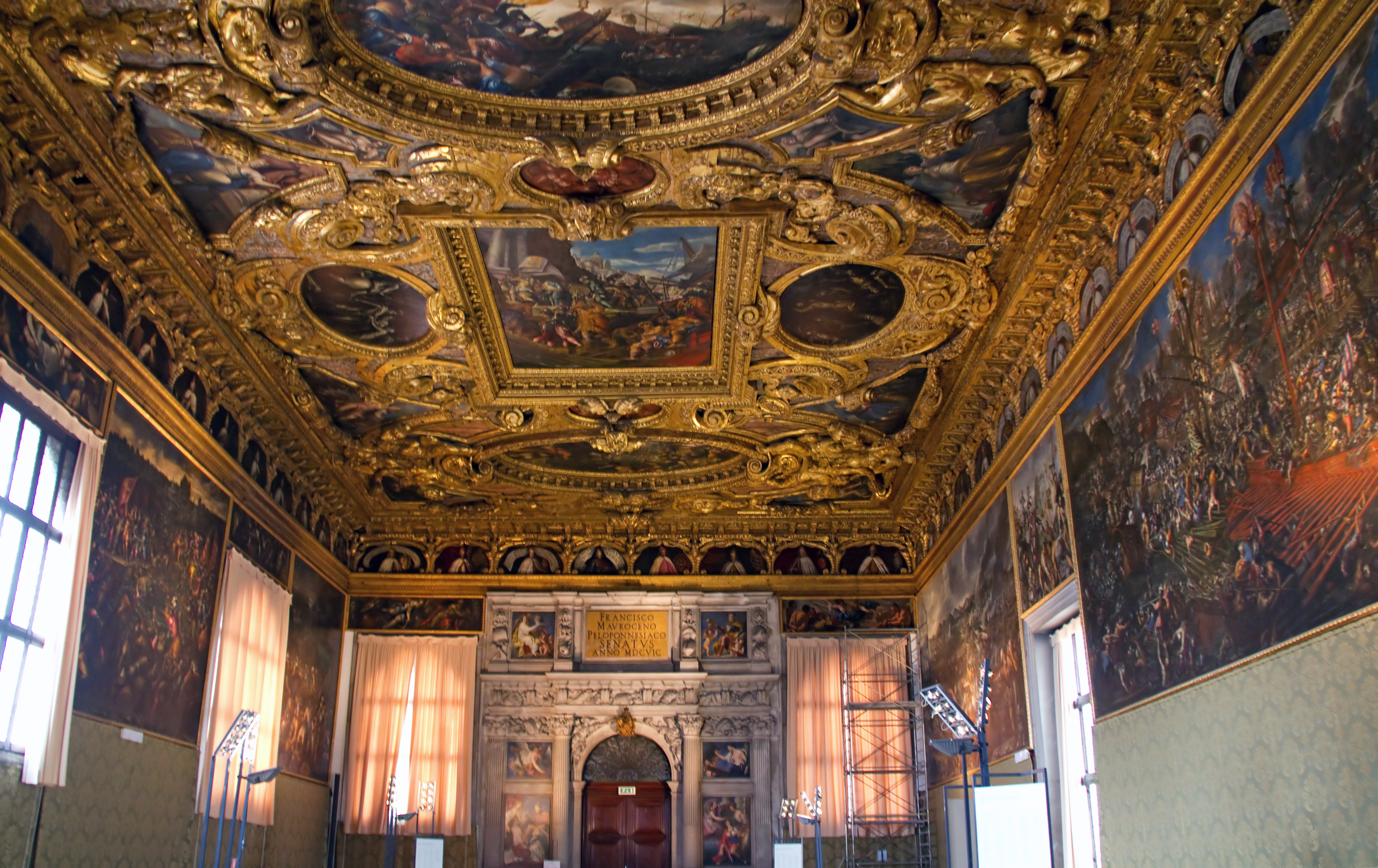 Doge's Palace Ceiling 8